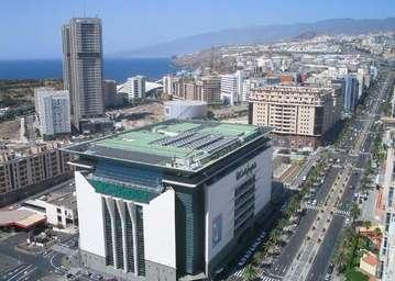 Avenida Tres de Mayo y zona de Cabo-Llanos